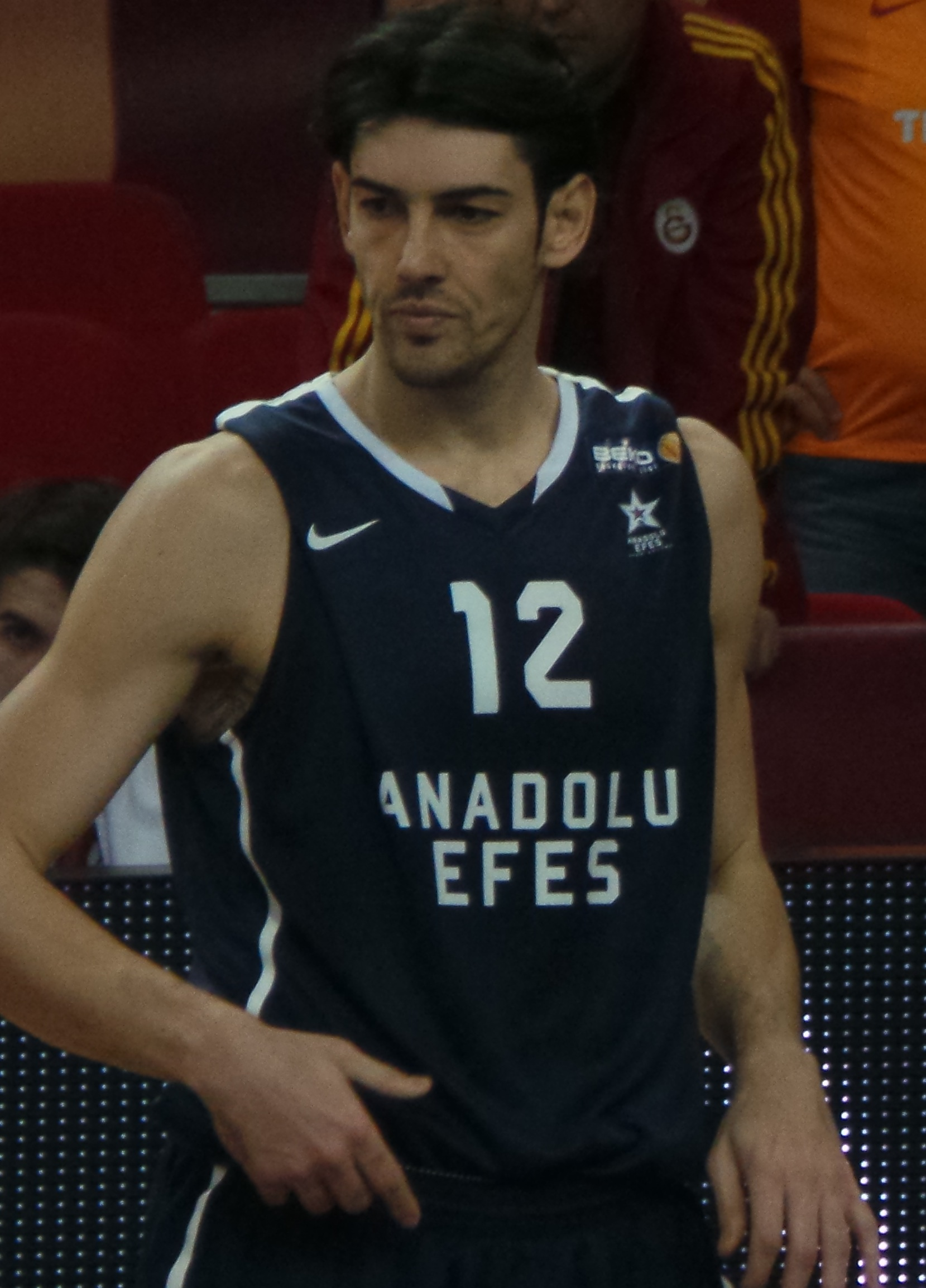 Kerem Gönlüm'14